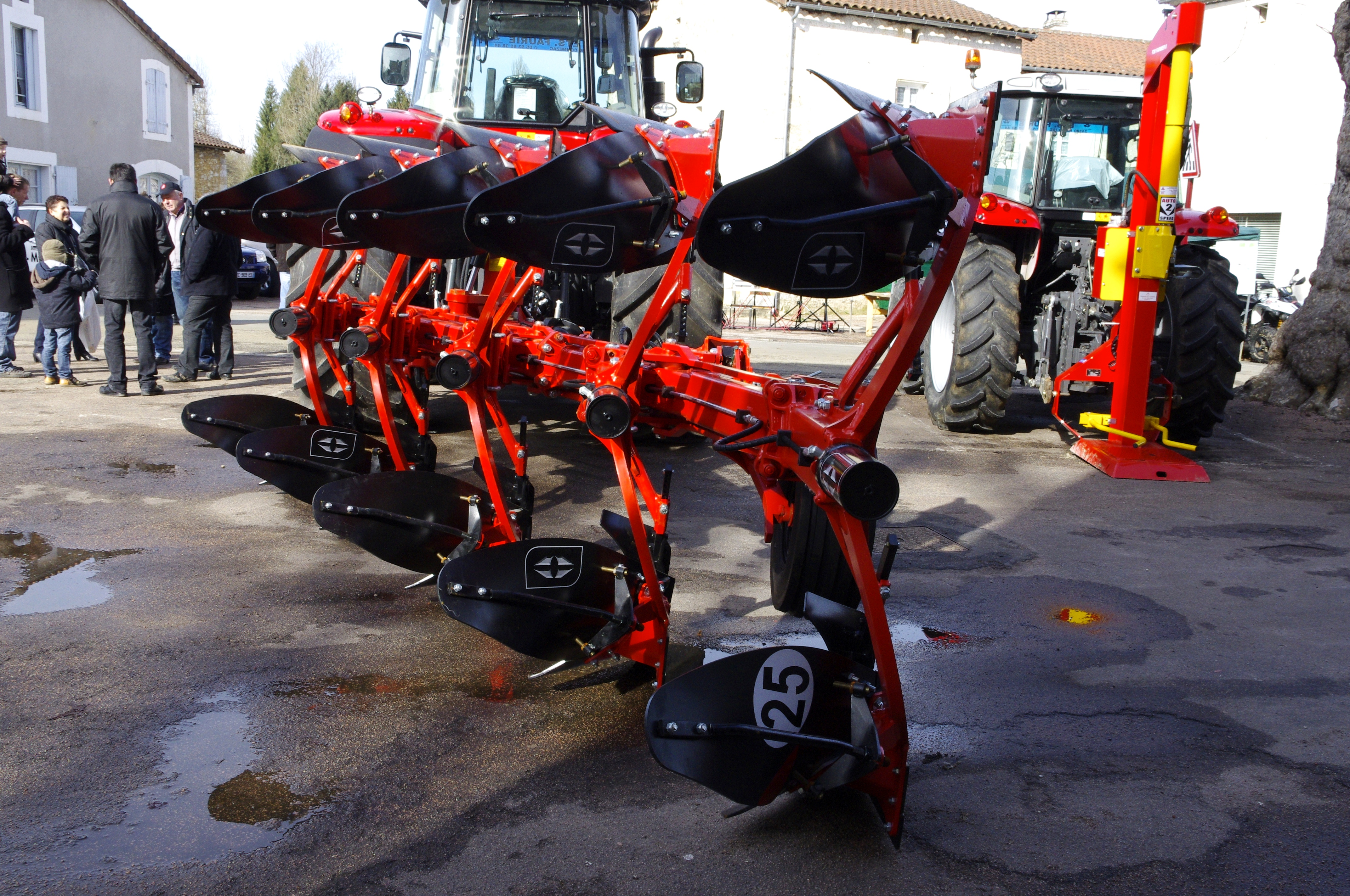 Charrue Gregoire Besson en Dordogne